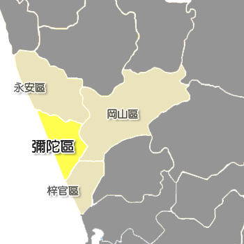 彌陀區相對位置